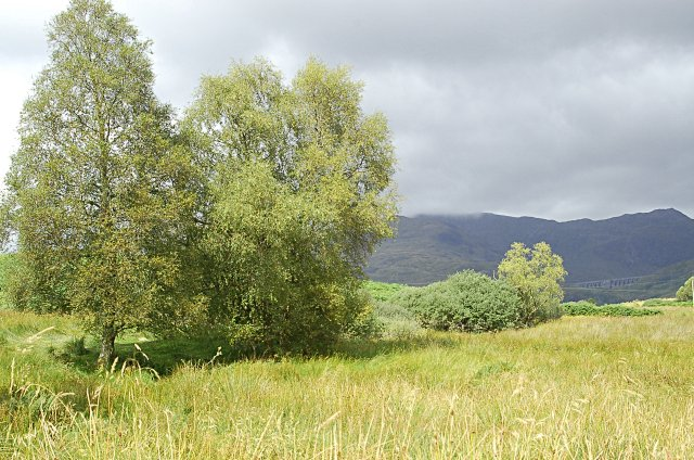 Near Ardanaiseig